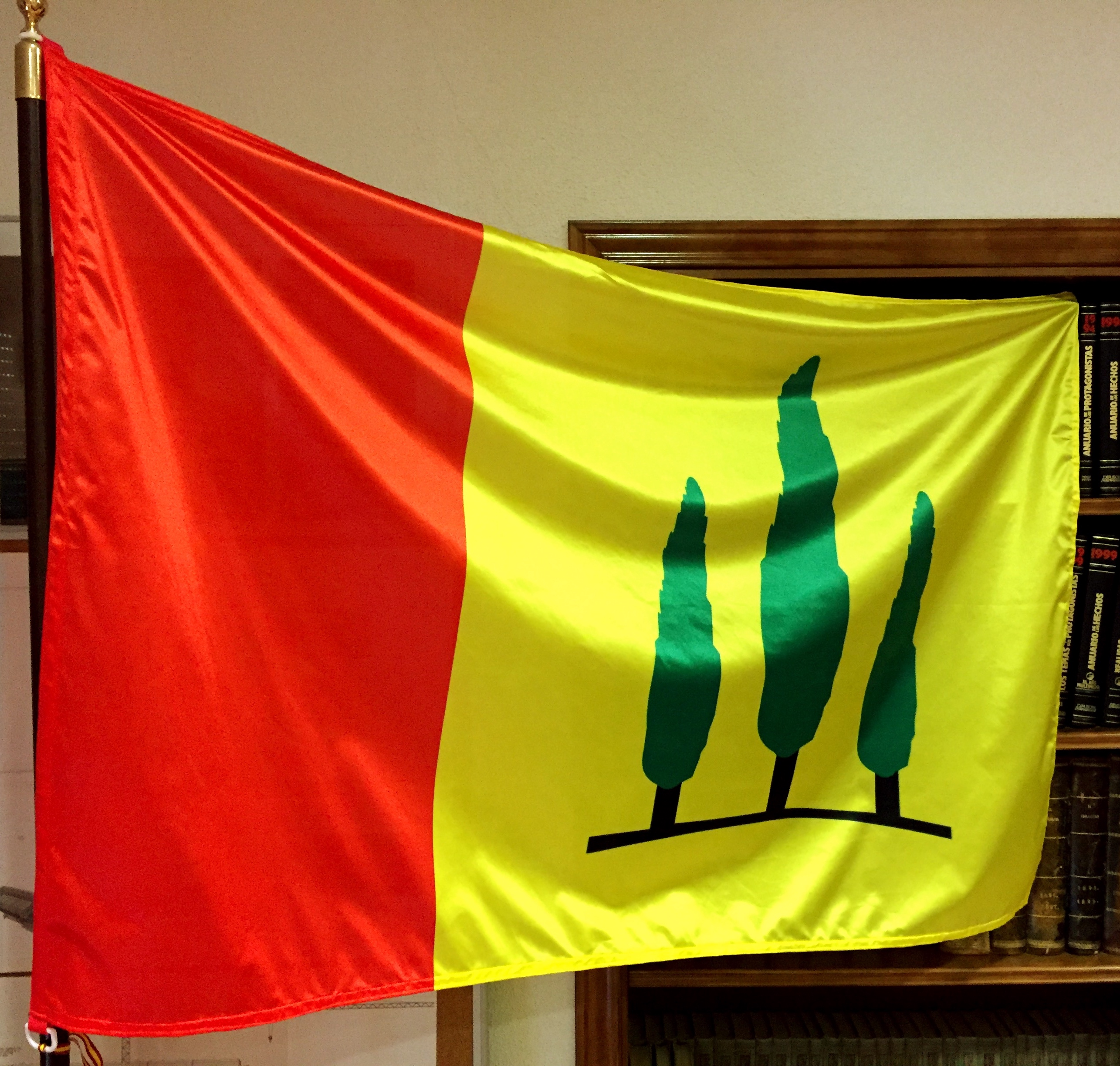 Bandera oficial del municipio de Quismondo que se encuentra en la sede del ayuntamiento